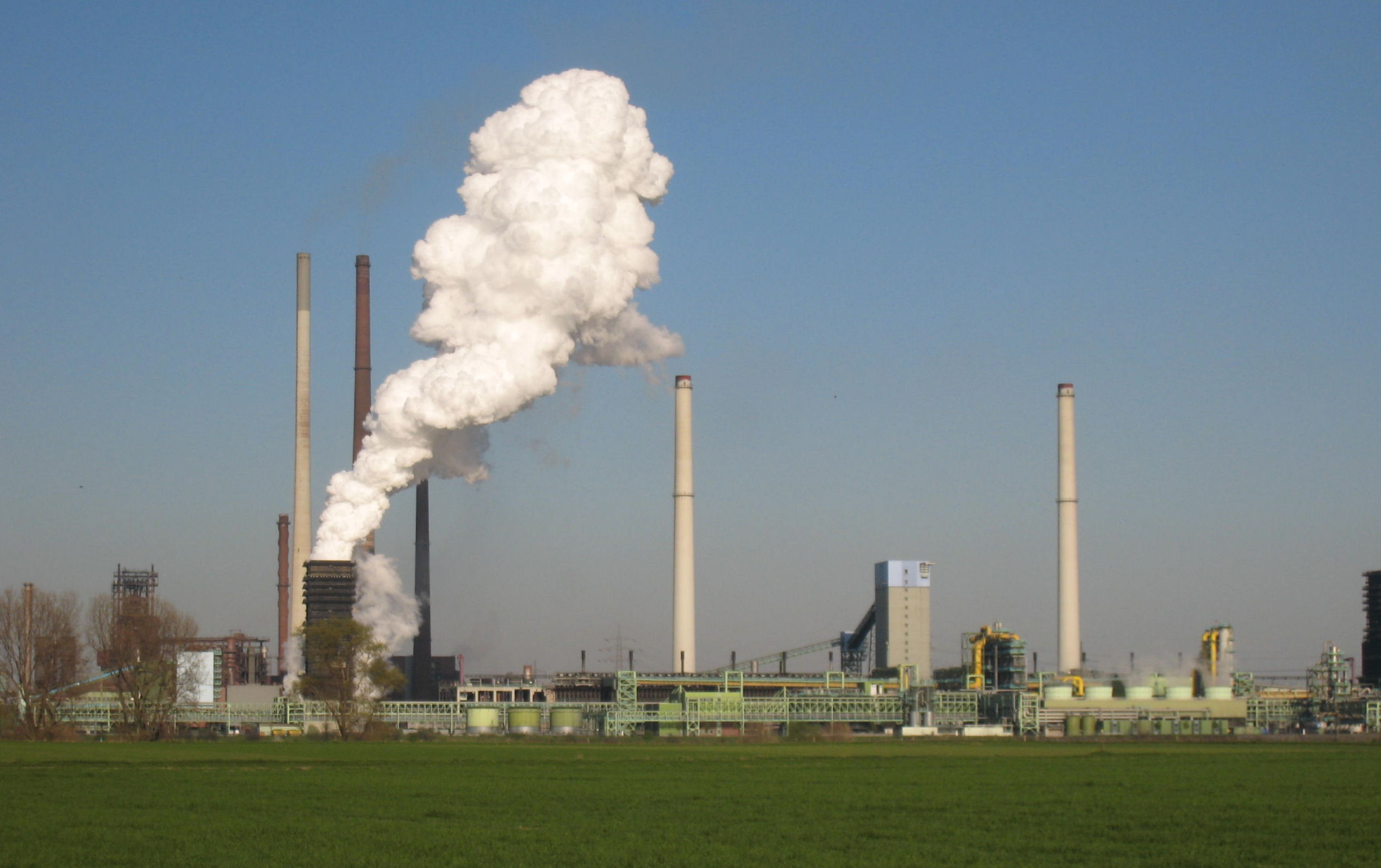 Kokerei Schwelgern Duisburg 2010